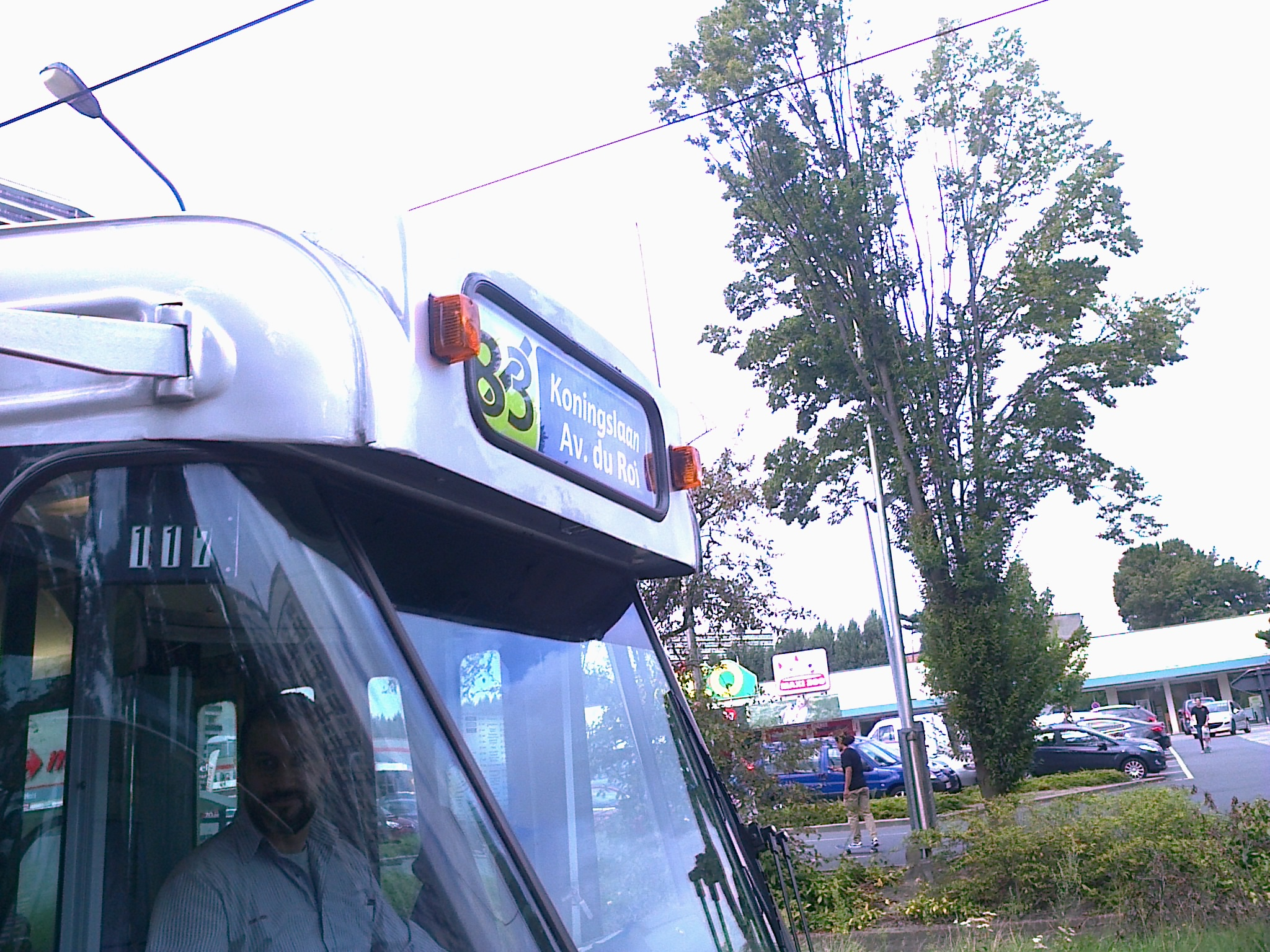 Tramway 83 à Anderlecht